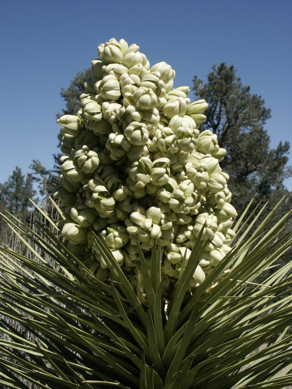 Los Angeles Co., CA, USA